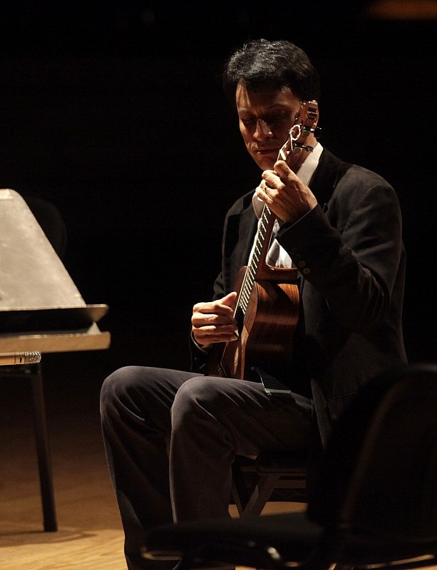 Concierto en el Teatro "Teresa Carreño".